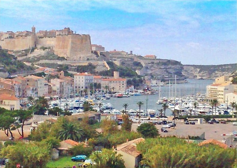 Bonifacio, vue haute ville de la marine